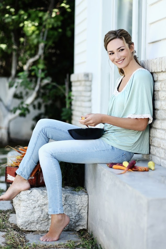 מיכל אנסקי